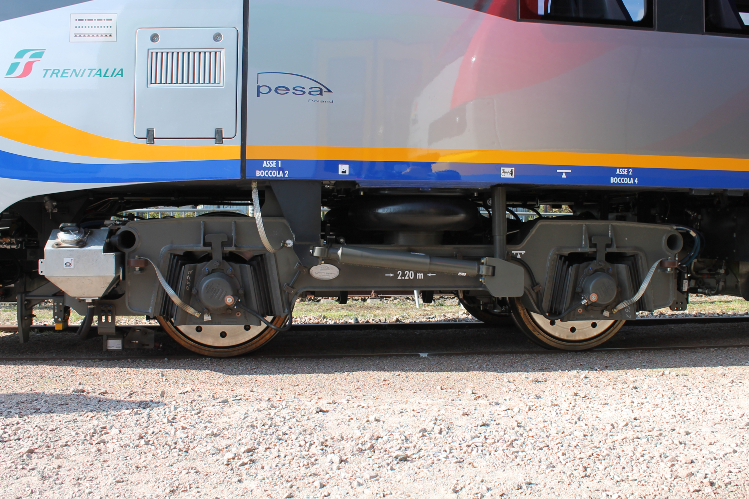 Wózek napędny spalinowego zespołu trakcyjnego Pesa Atribo podczas targów Trako 2015. The making of this document was supported by Wikimedia Polska Association, within Wikigrant no. WG 2015-34.